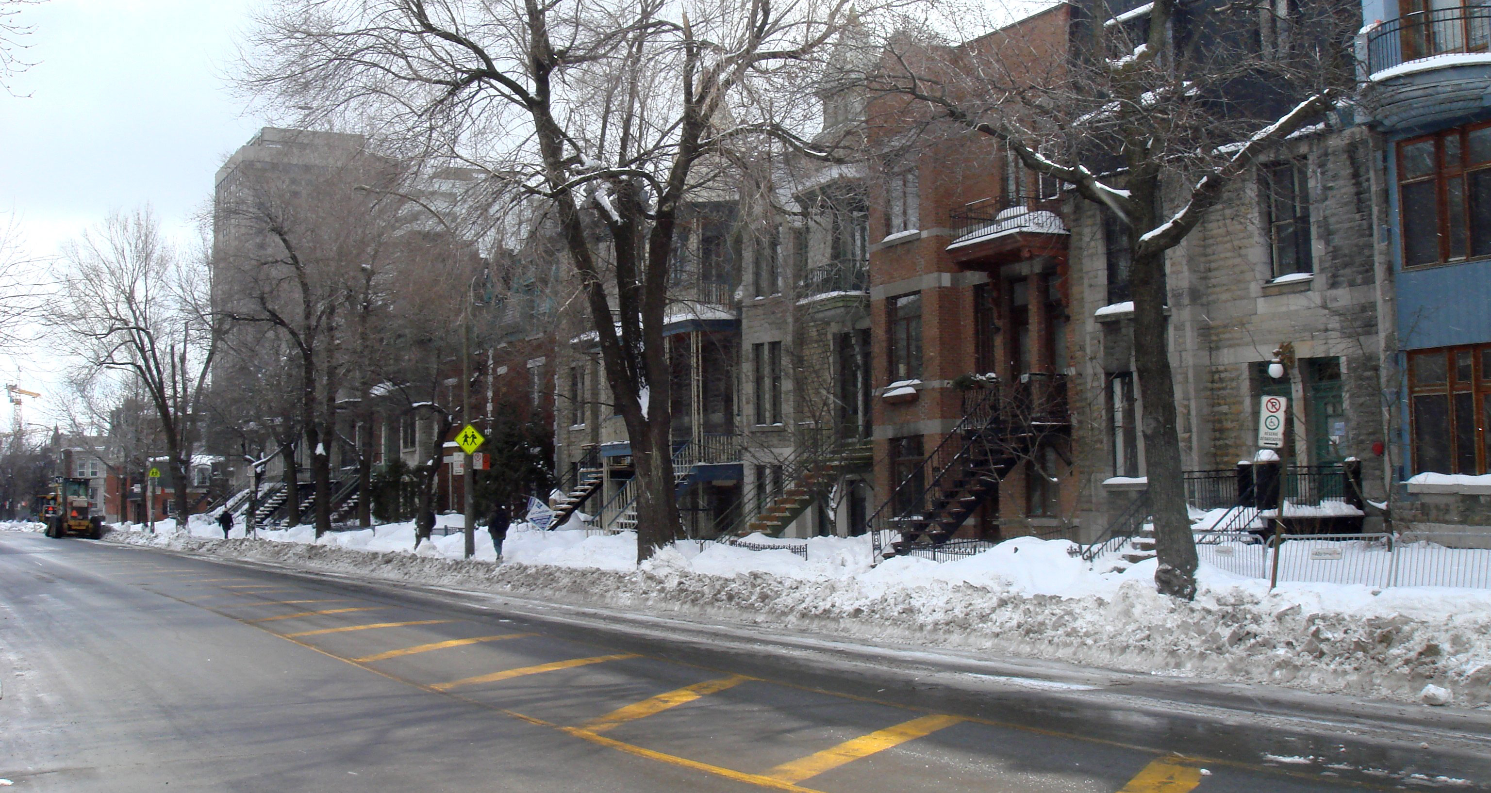 Déneigement dans la rue Saint-Hubert à Montréal (Québec) Canada.